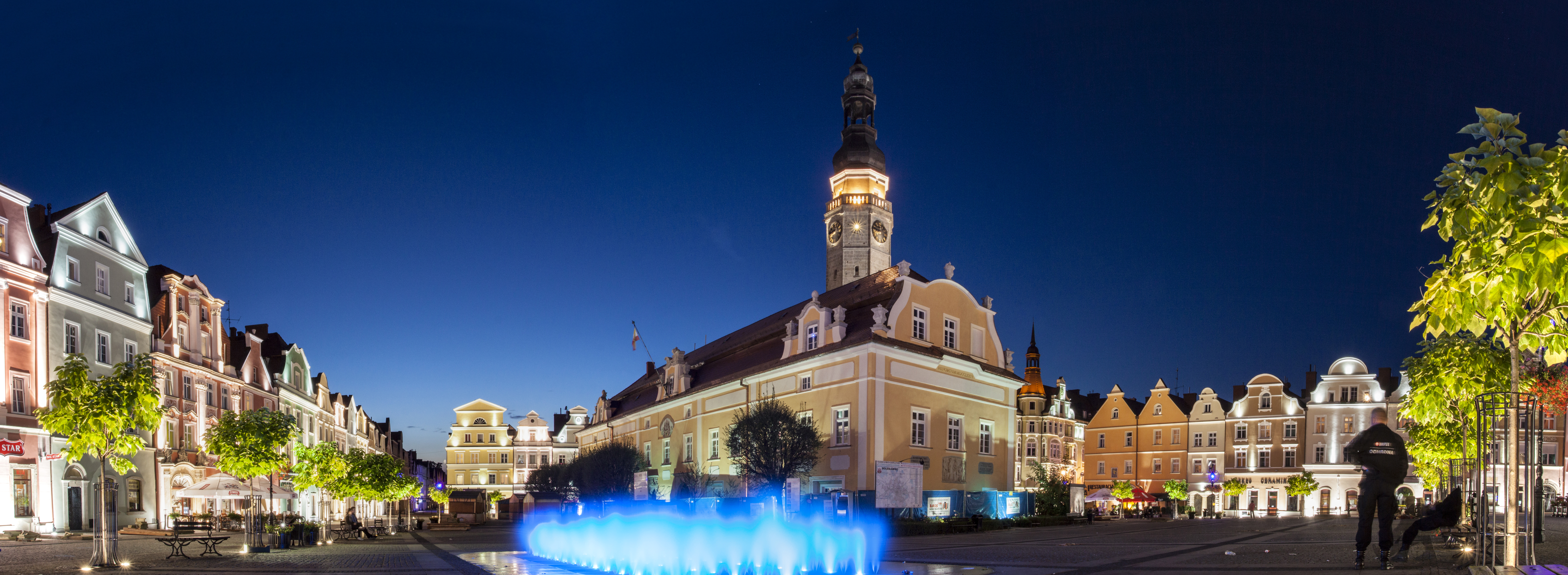 Bolesławiec, ośrodek historyczny miasta